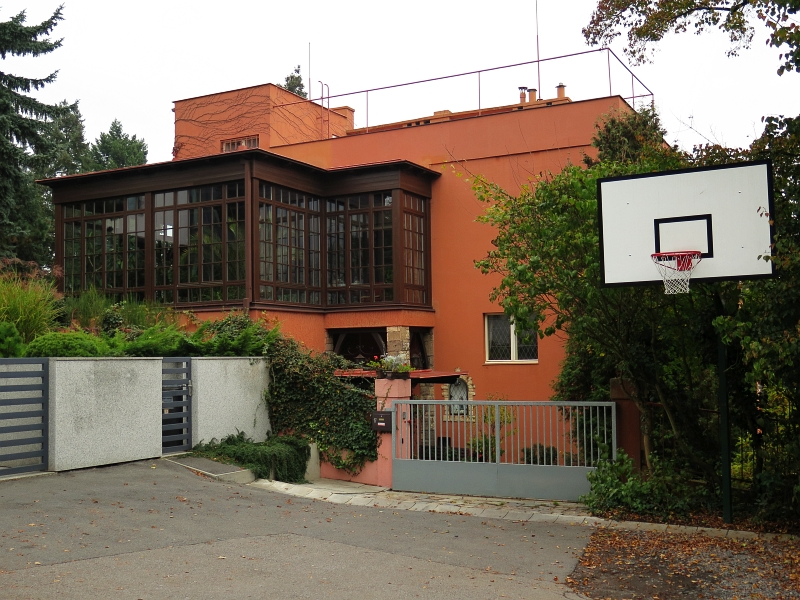 Vila Skalní 17, Skalní 172/17, Barrandov.